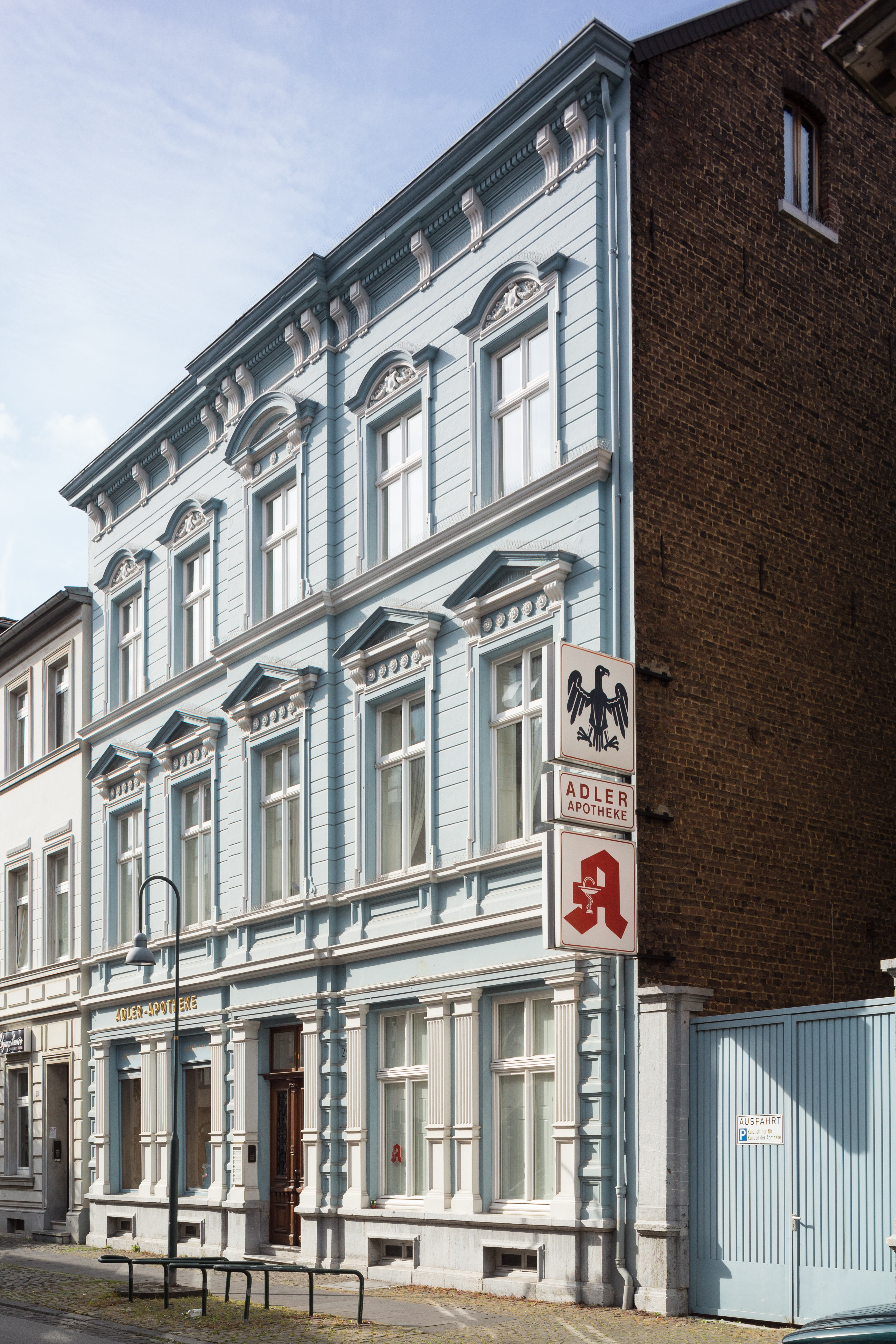 1880 errichtetes Gebäude der Eschweiler Adler Apotheke.